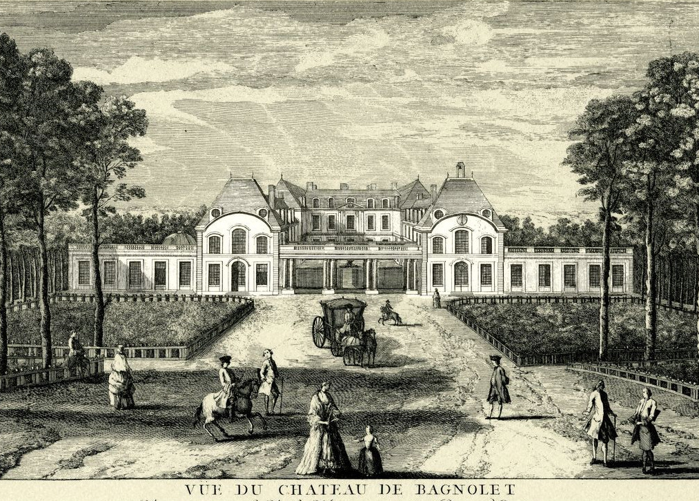 Château et avant-cour ; vue du côté Bagnolet (vue partielle).